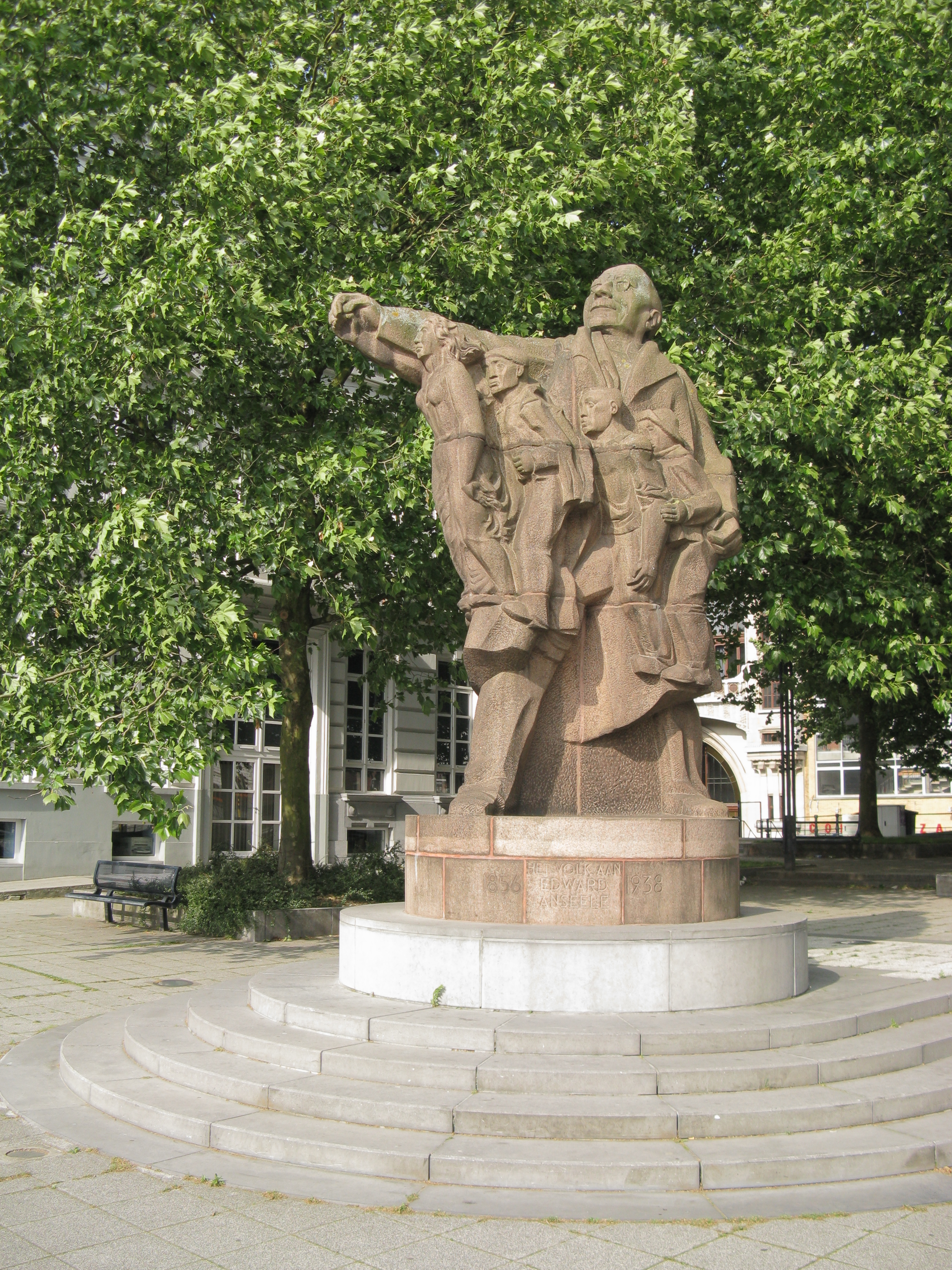 Standbeeld van Edward Anseele aan het Zuid in Gent.